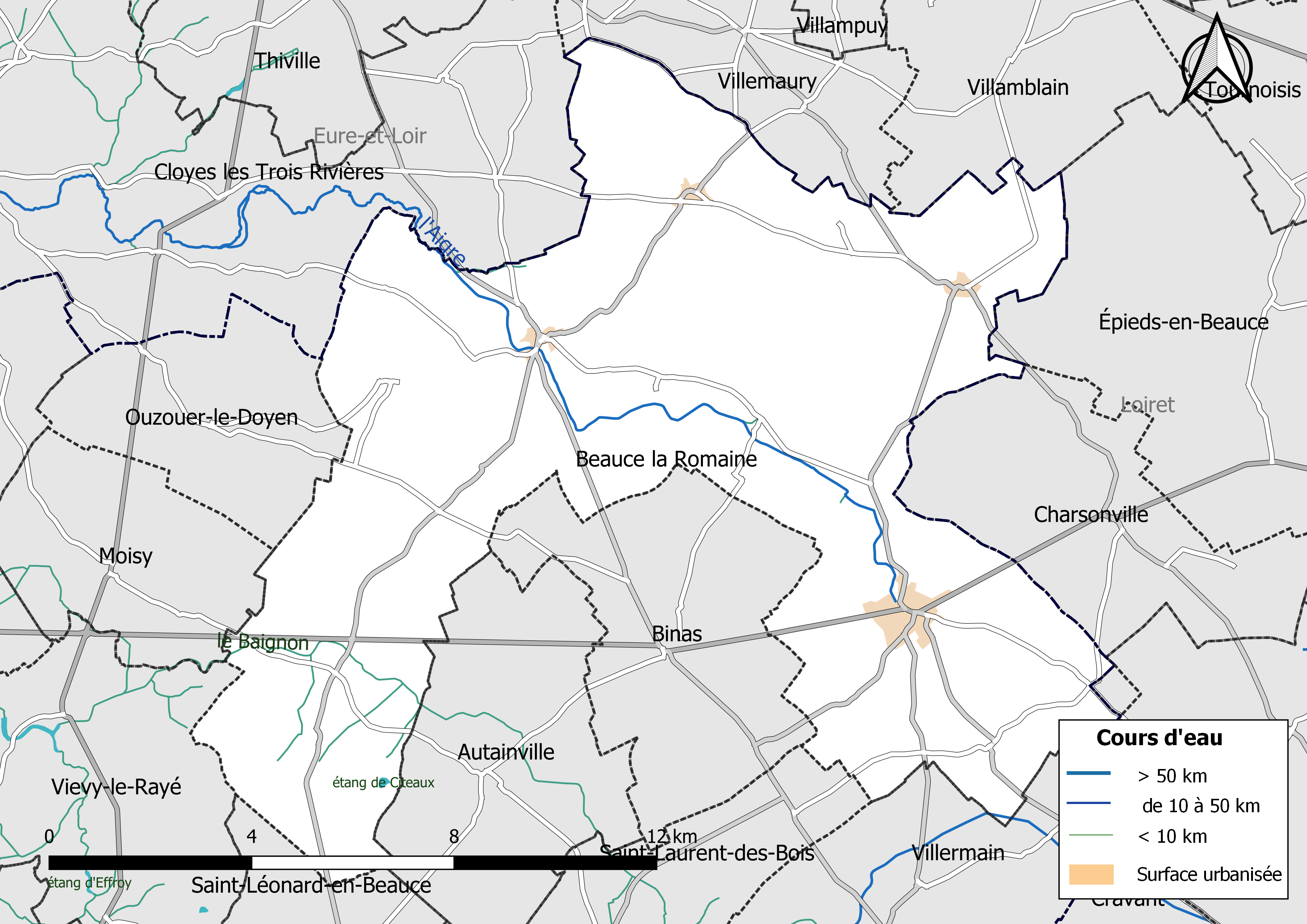 Carte du réseau hydrographique de la commune de Beauce la Romaine (Loir-et-Cher, France).